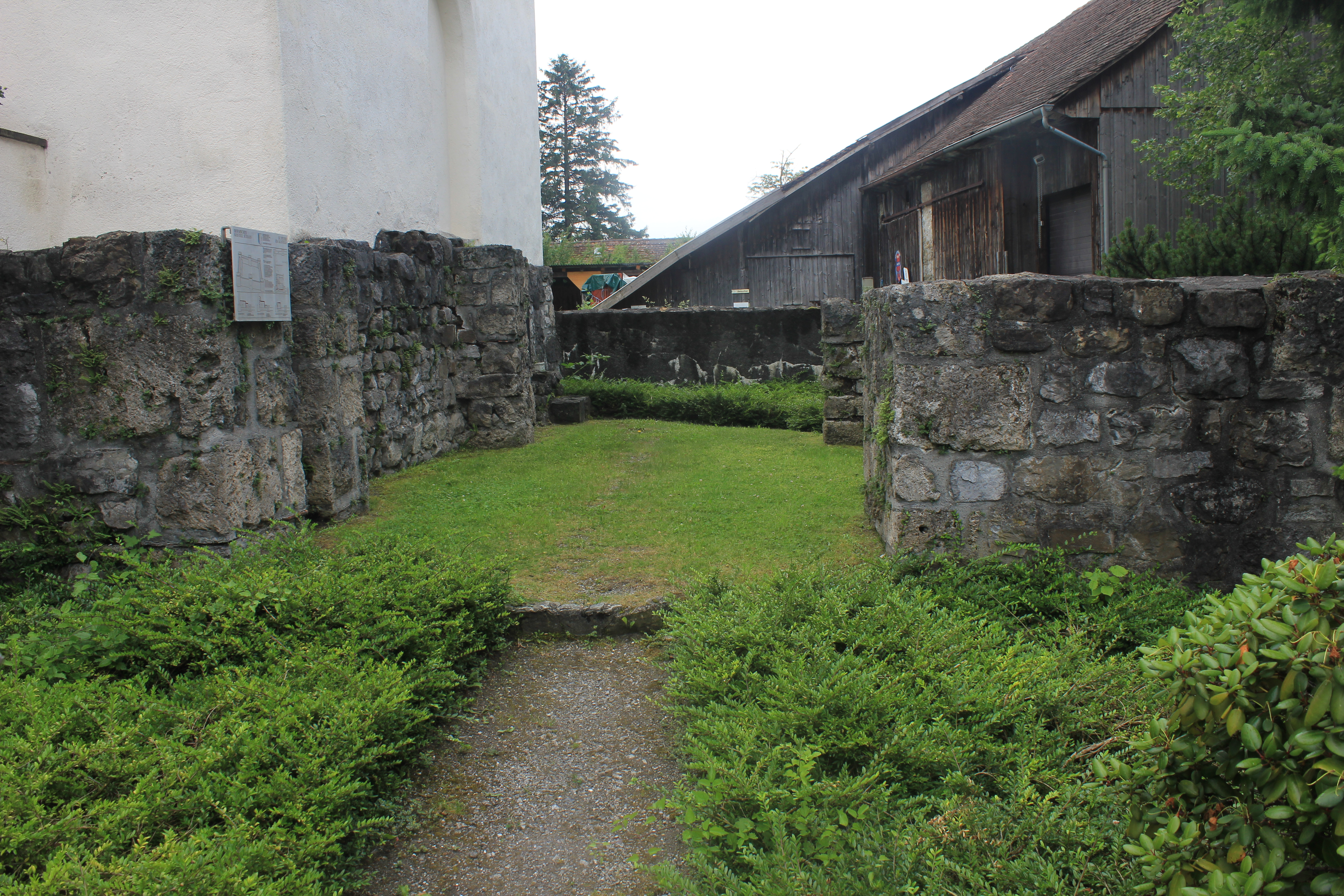 Reste des Kastells Schaan bei der ehemals romanischen Kapelle St. Peter.